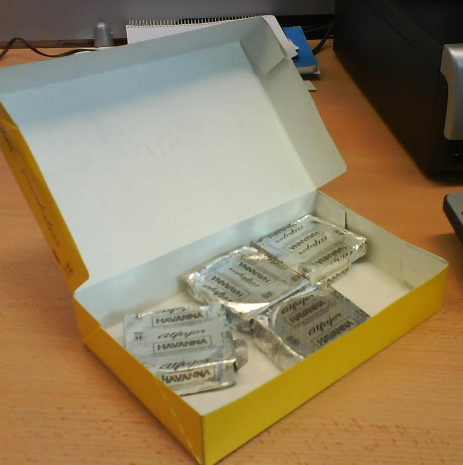 Juas juas, muéranse de envidia...